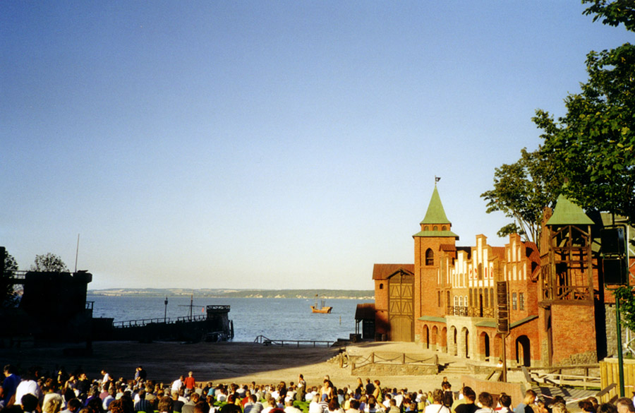 Störtebeker-Festspiele / Bühne